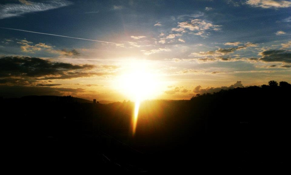 ocaso